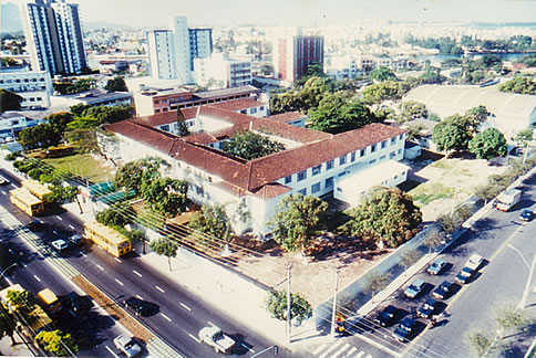 emescam1